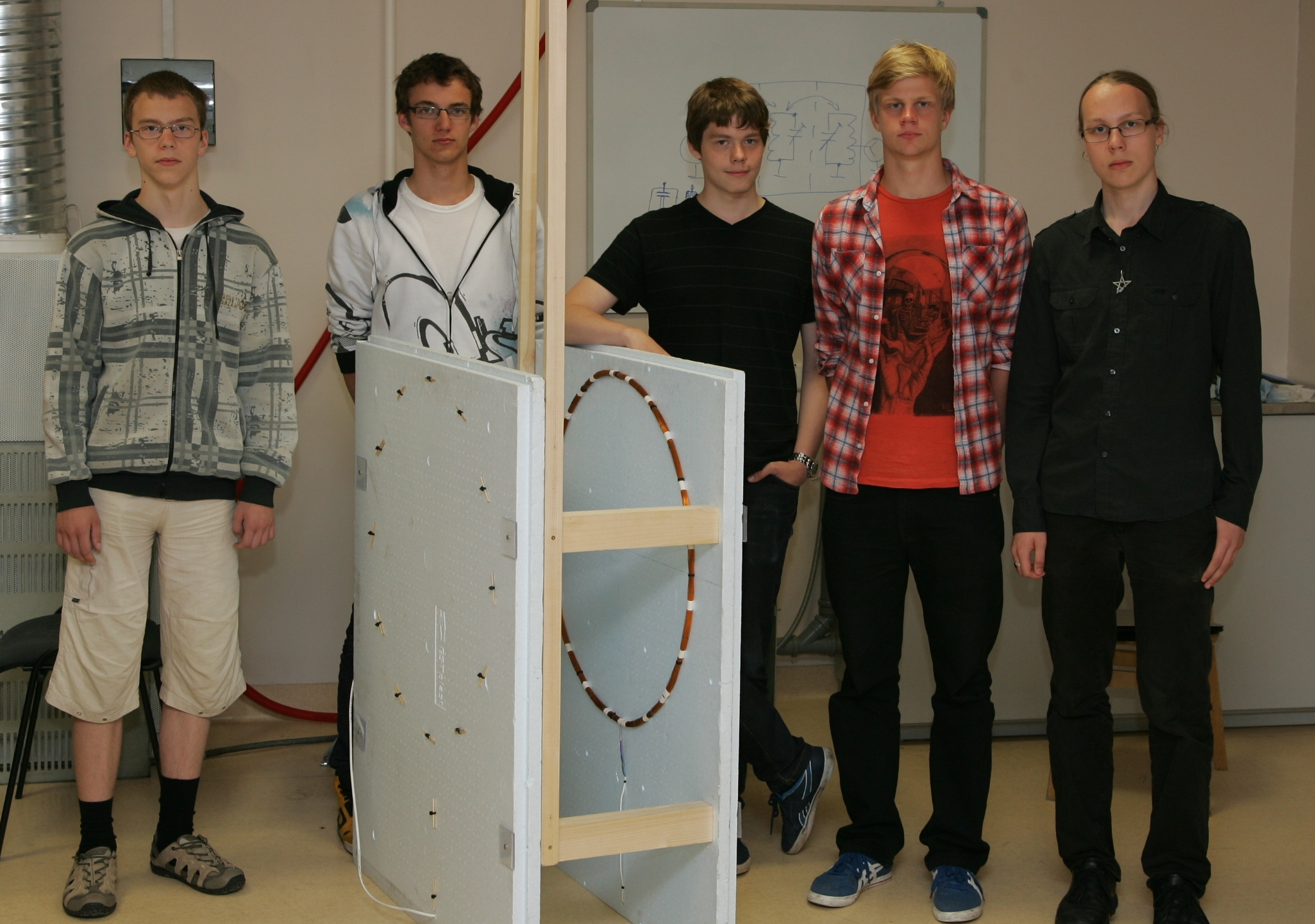 Teadusmaleva 2012. aasta osalejad Jürgen Laks, Mats Mikkor, Timothy Henry Charles Tamm, Jaan-Eerik Past ja Siim Kurvits Tartu Observatooriumi kosmosetehnoloogia laboris.